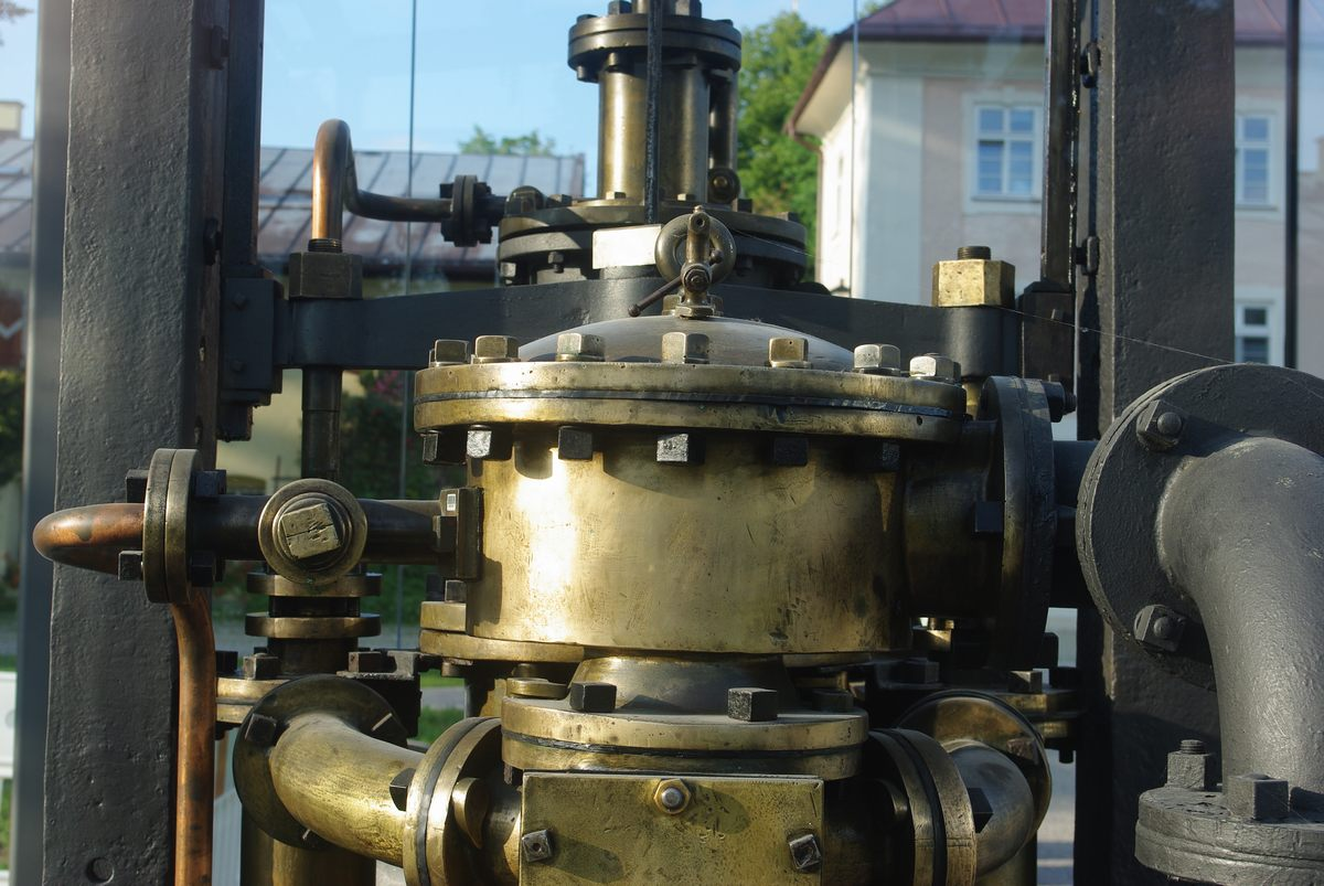 Originale Reichenbachsche Wassersäulenmaschine im Salinenpark Traunstein